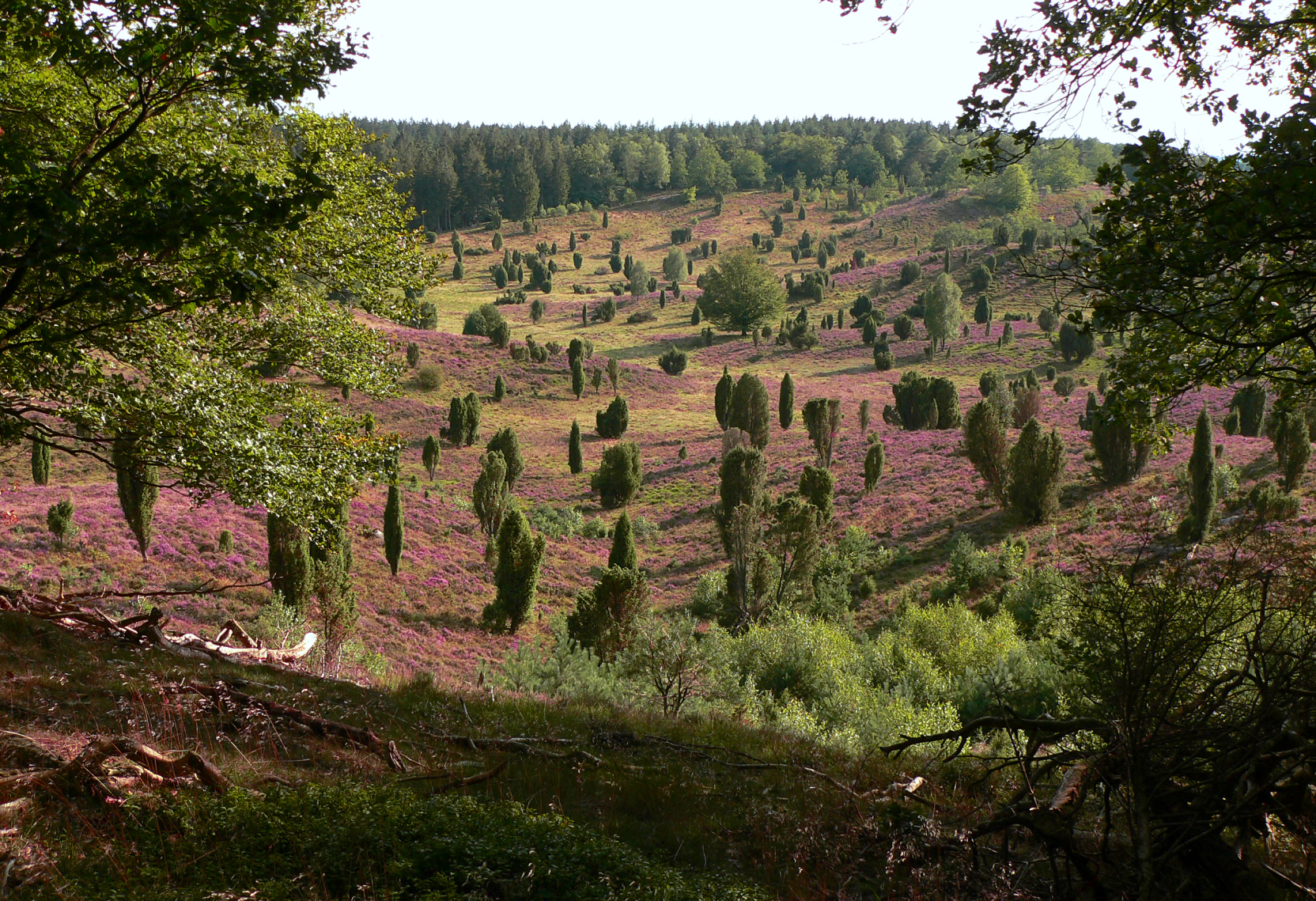 Totengrund, typische Landschaft der Lüneburger Heide mit hochgewachsenen Wacholderbüschen